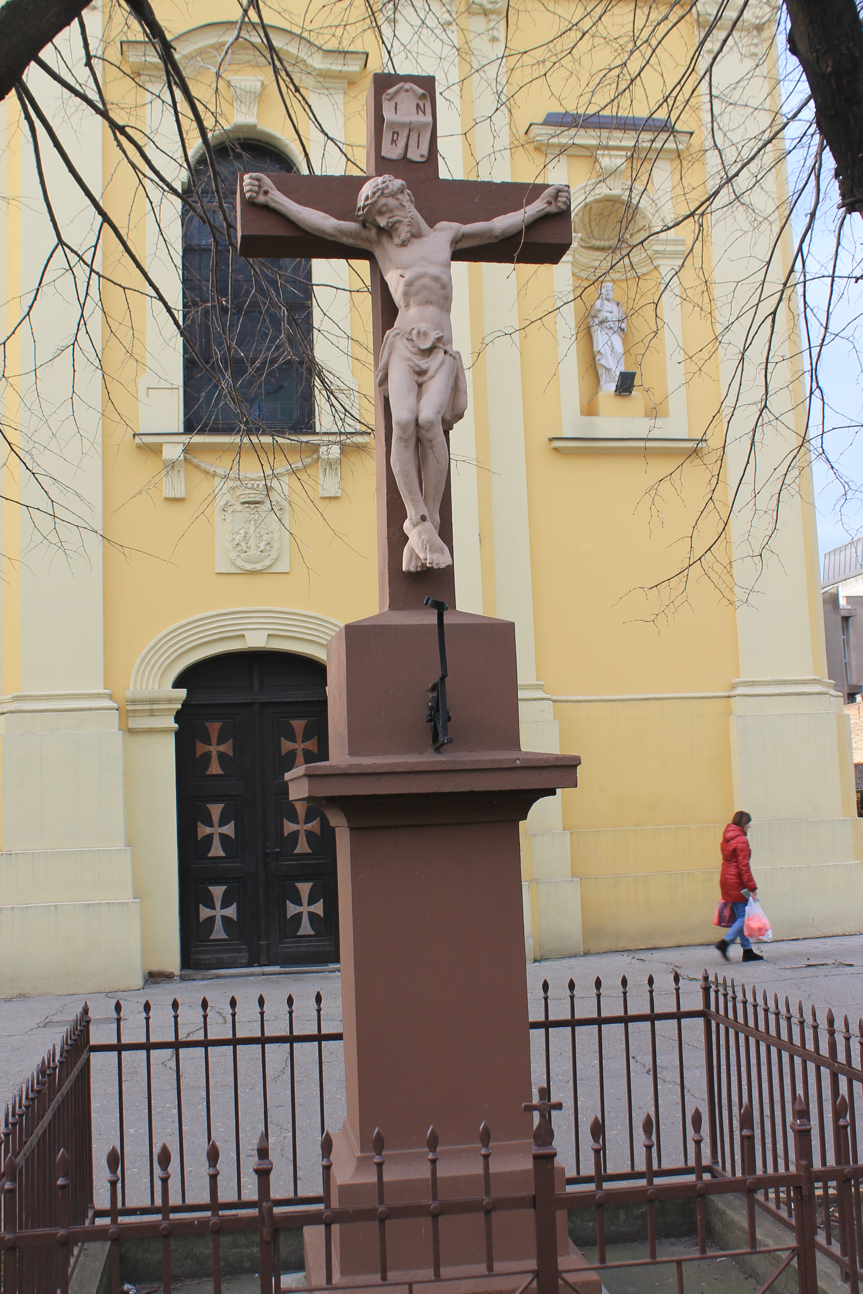 Rimokatolička crkva Uzdizanja Časnog krsta u Rumi